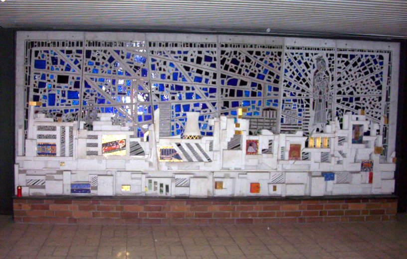 Bild des Reliefs Das Leben des Bergmannes von Werner Busche auf dem Gelände der Grube Göttelborn